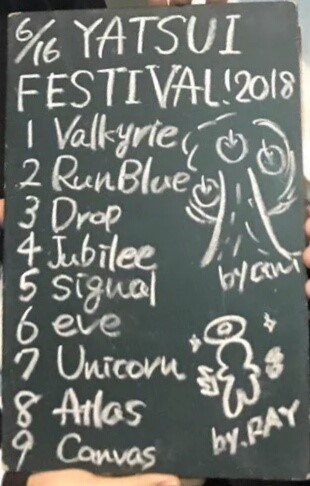 amiinAセトリボード(20180616(1))